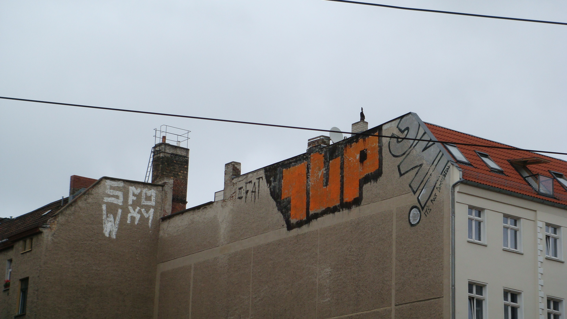 Rooftop Graffiti von 1UP